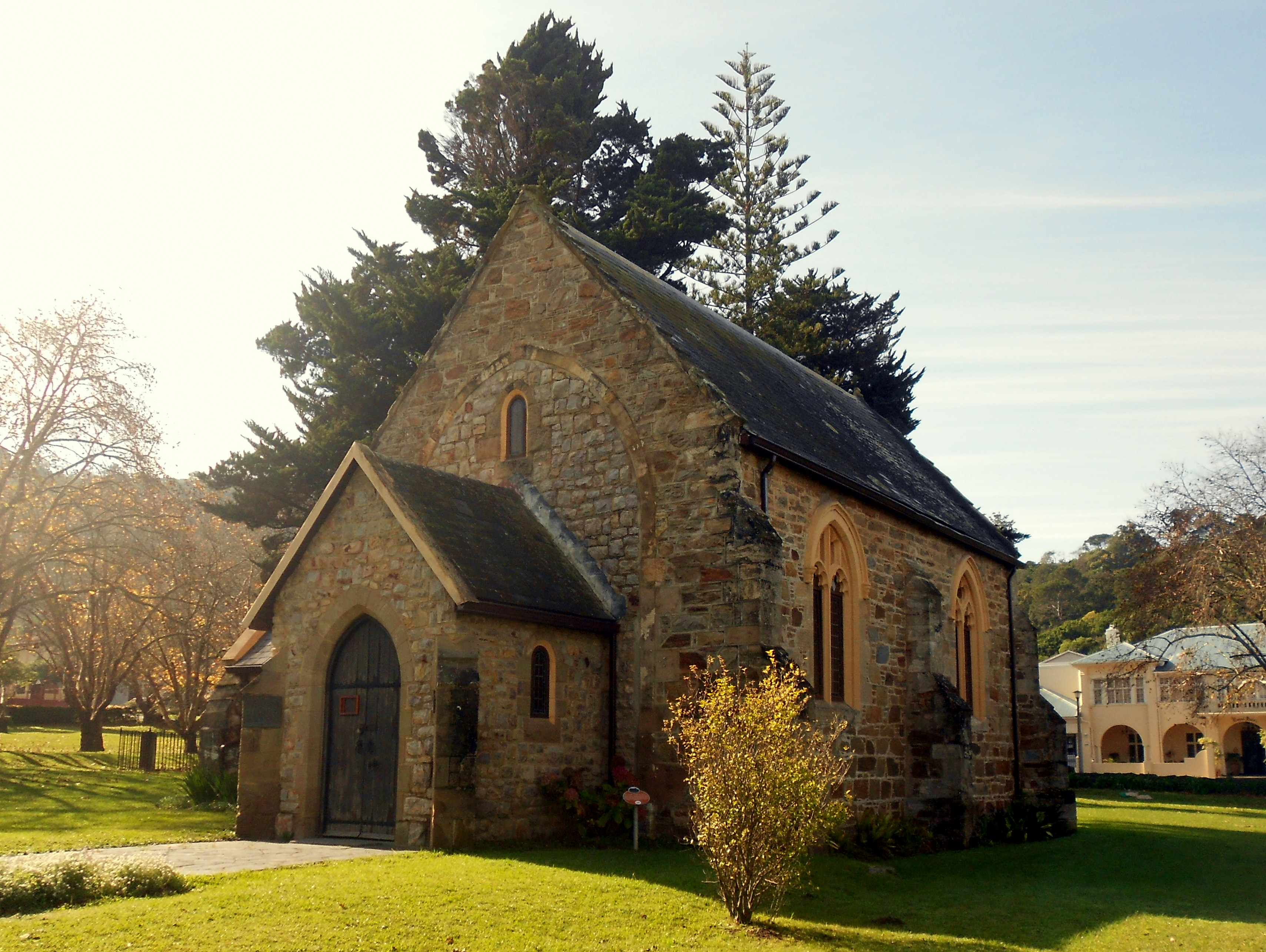 St George's Kerk, Knysna 1849